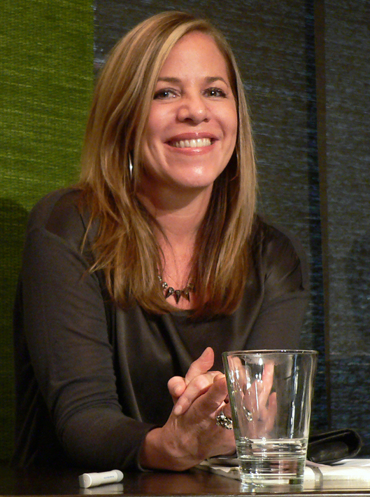 Alyson Noël bei einer Lesung in Hannover